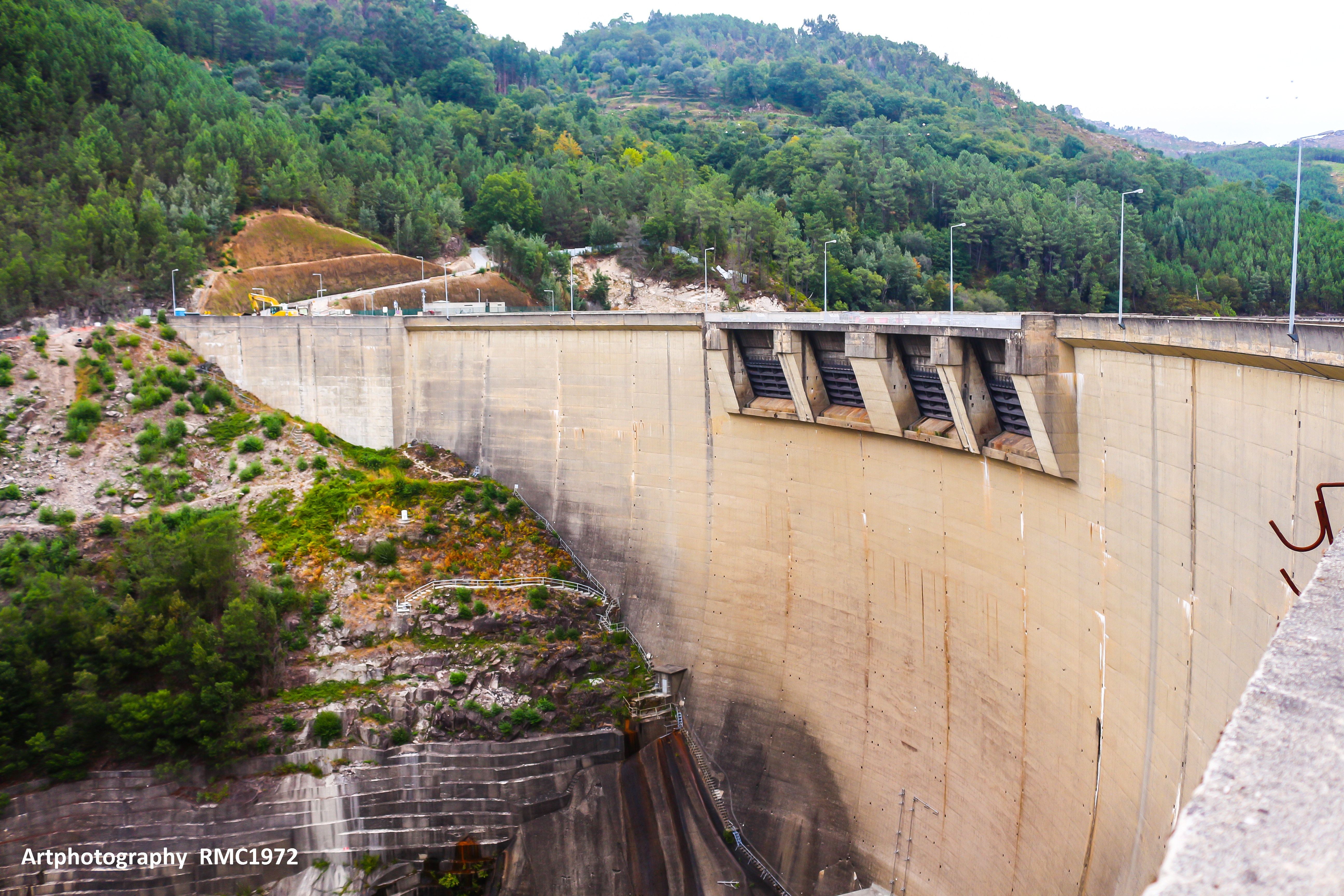 Baragem Salomonde - Portugal - Braga